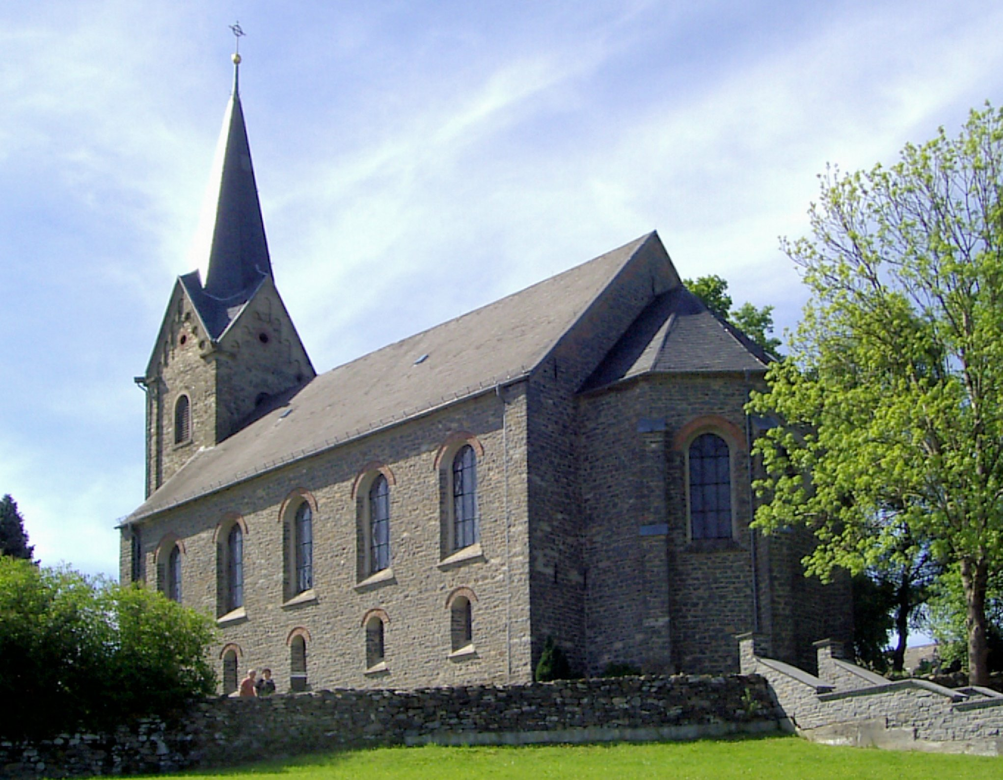 Evangelische Kirche in Kirburg, Westerwaldkreis, Rheinland-Pfalz, Deutschland